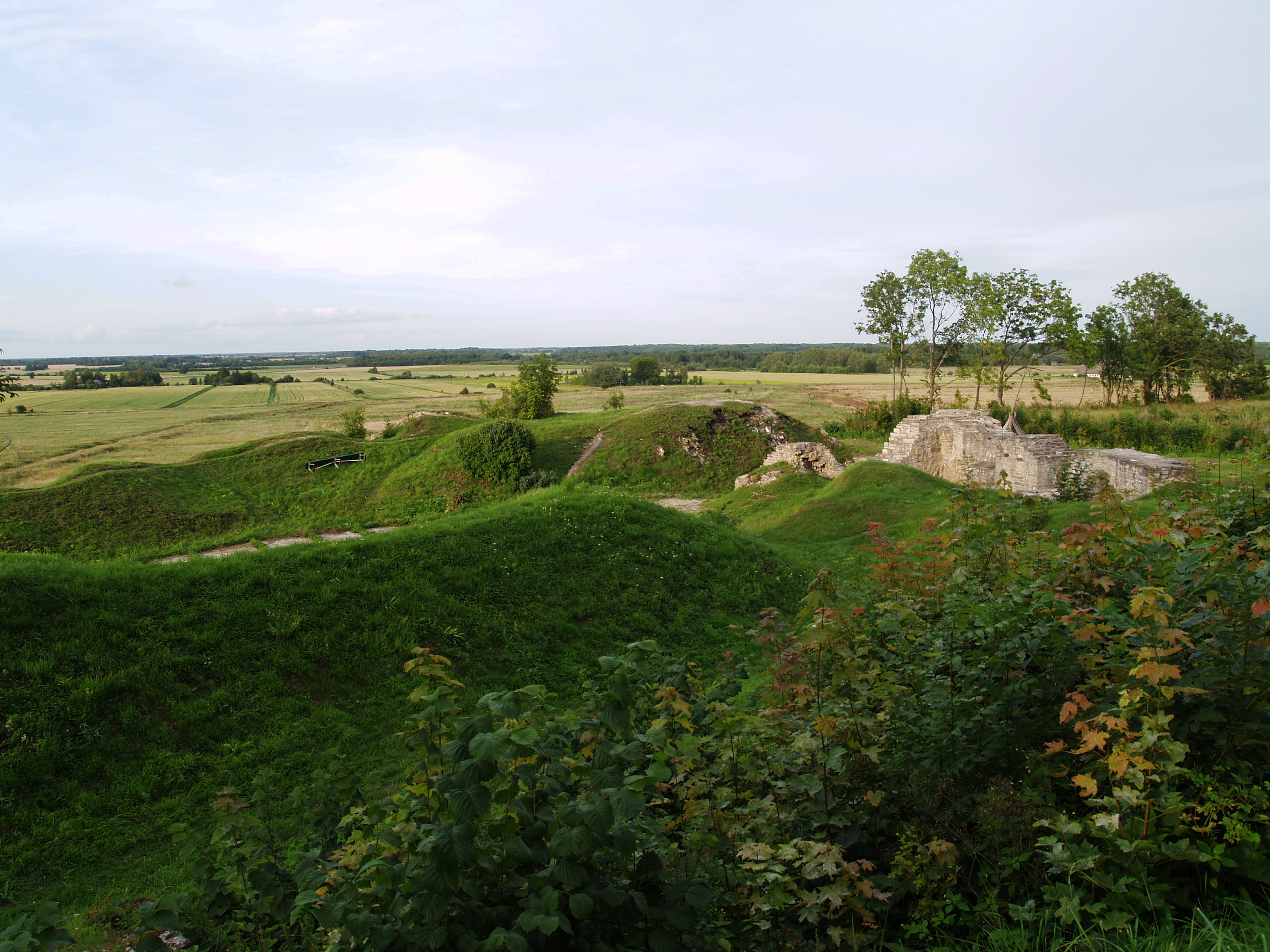 Lihula linnuse varemed vallikraavidega